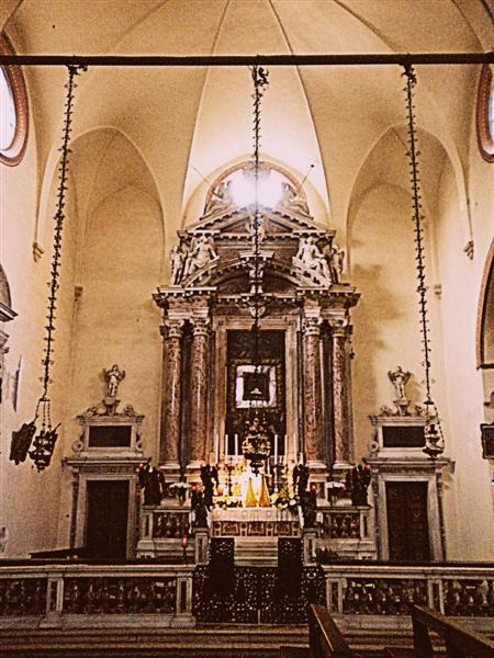 L'altare del Santissimo Sacramento nella chiesa di San Francesco Grande a Padova